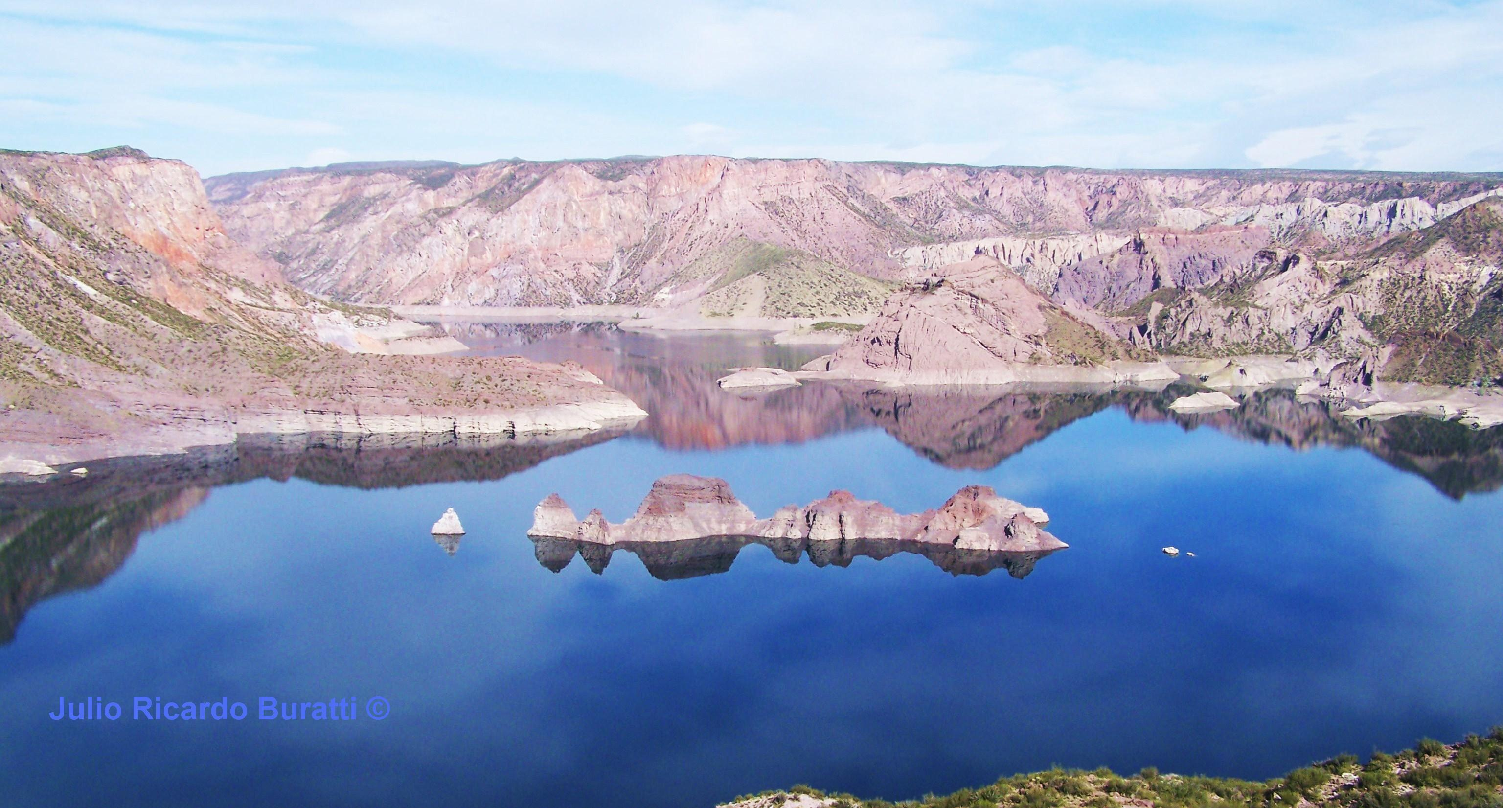 Formación "El Submarino" Isla dentro del lago formado por el Embalse Valle Grande, Cañon del Atuel, San Rafael, Mendoza.